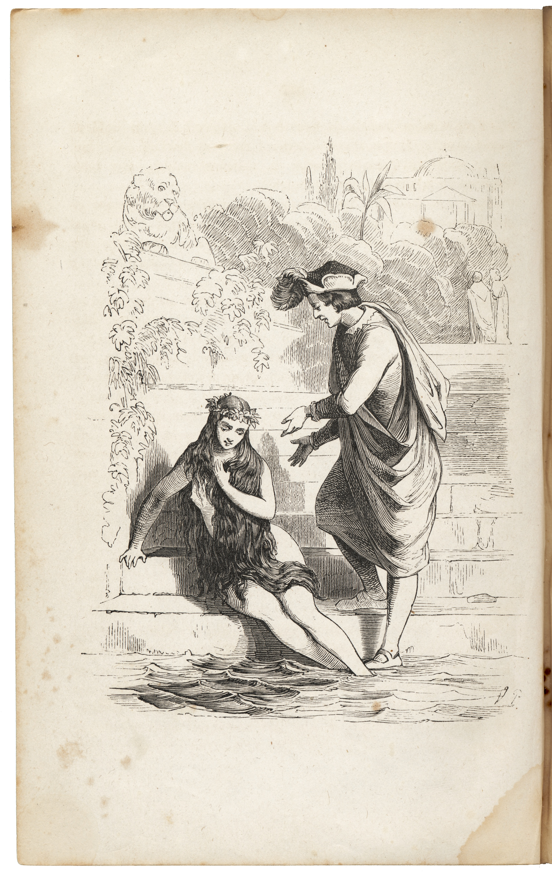 Verzamelde vertellingen en sproken / van H.C. Andersen ; volledige uitgave door den schrijver zelven bezorgd ; naar de zesde Hoogduitsche uitgave door C. de Jong ; met 16 platen en portret ; [platen van Vilhelm Pedersen, gestoken door E. Kretzmar ; portret van C.L. van Kesteren] ; [met een voorwoord van de vertaler en uitgever]. - 2e dr. - Utrecht : B. Dekema, [1859]. - 2 dl. (X, 206 p., 217 p. [17] bl. pl.). : zw. houtgrav. ; 20 cm Image uploaded on 02-10-2013 from the Flickr stream of the Royal Library, The Hague (Koninklijke Bibliotheek, KB, national library of the Netherlands)